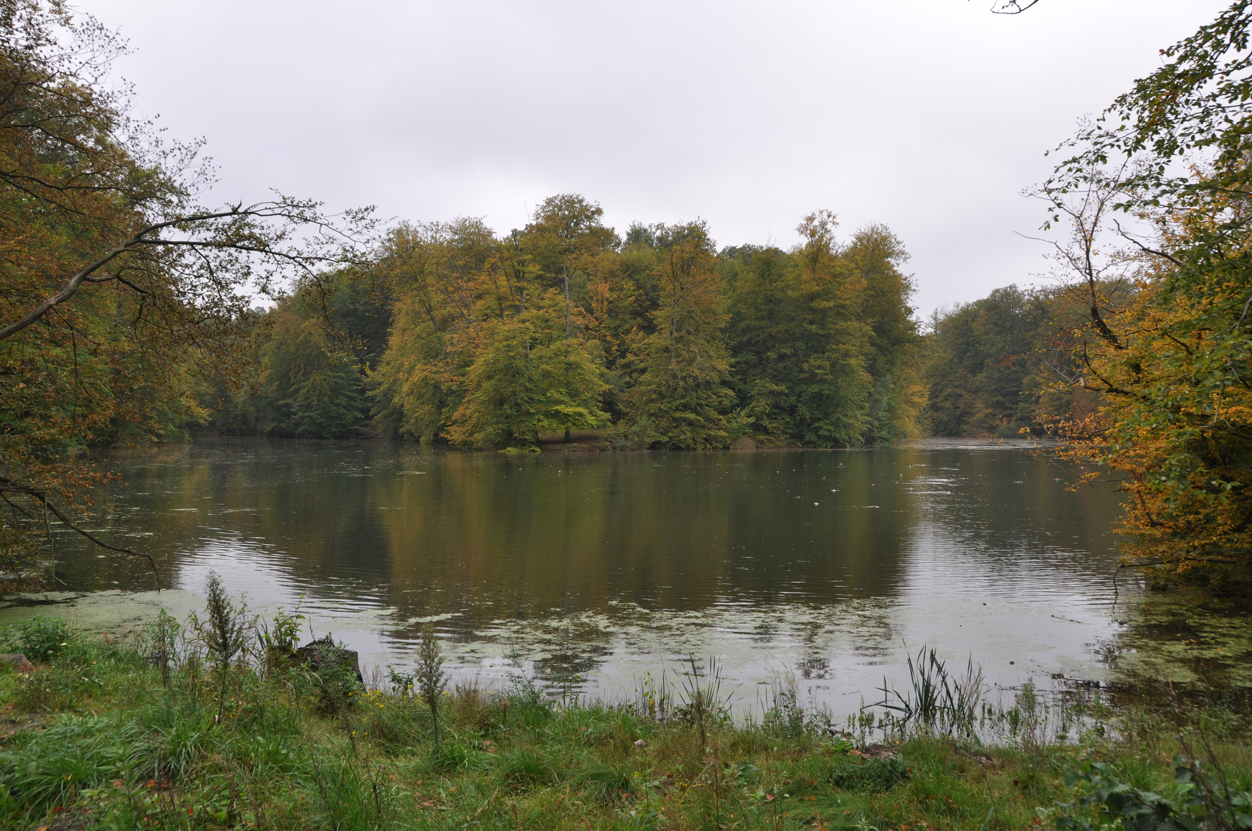 Etang de la Patte d'Oie (Groenendael)